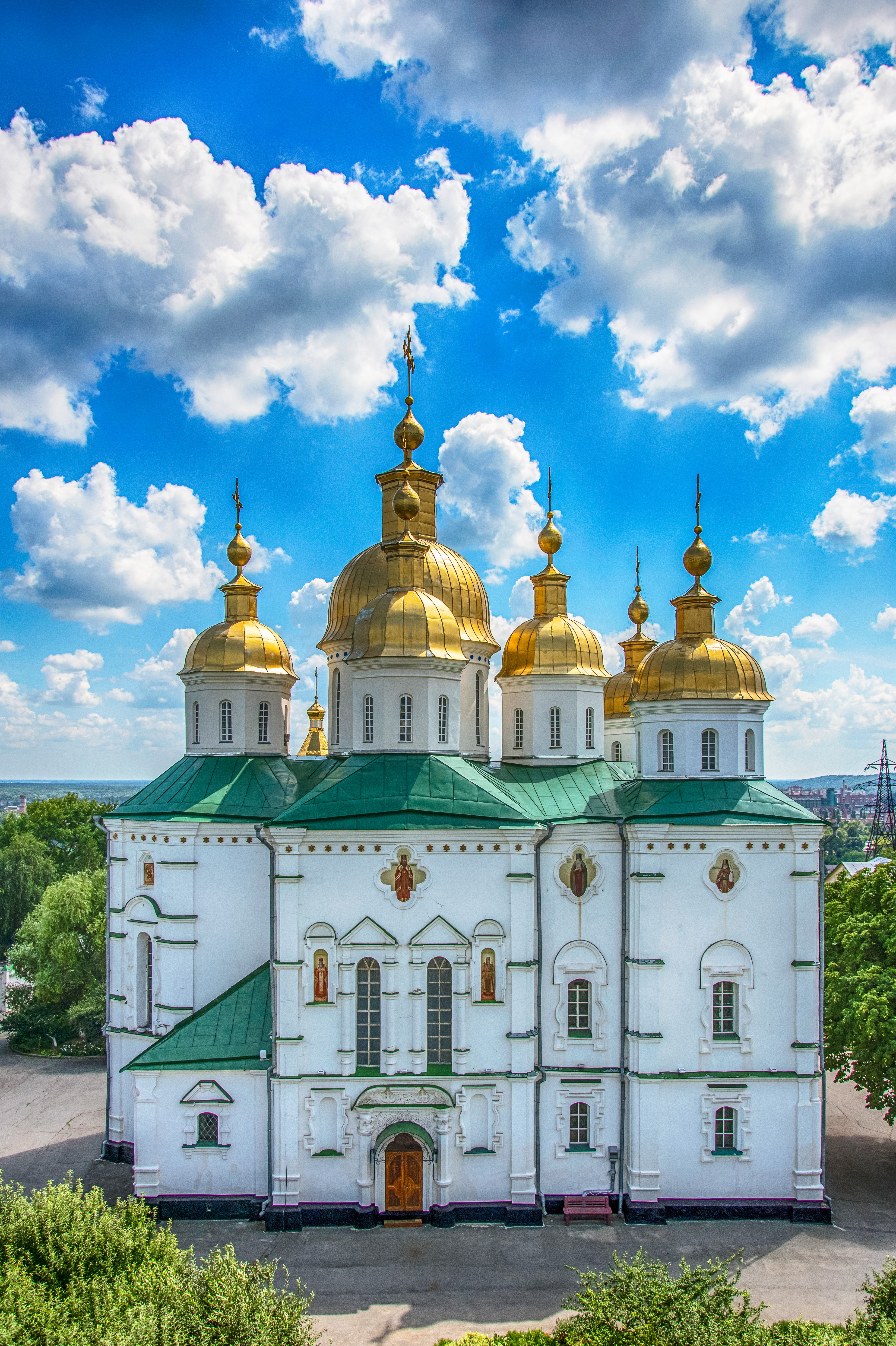 Здвиженський собор, Полтава, вул. П. Величковського (Свердлова), 2-А